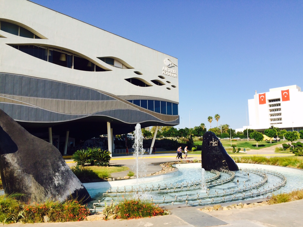 Океанариум в Анталье